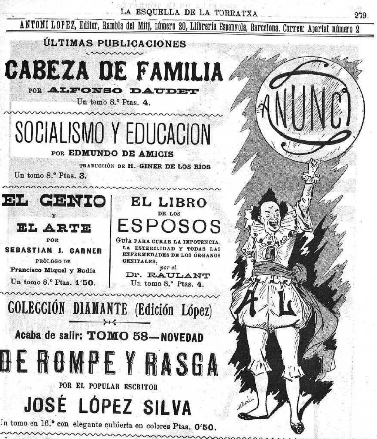 Página de la revista La Esquella de la Torratxa